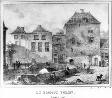 De Plompetoren aan de Utrechtse Plompetorengracht kort voor de afbraak